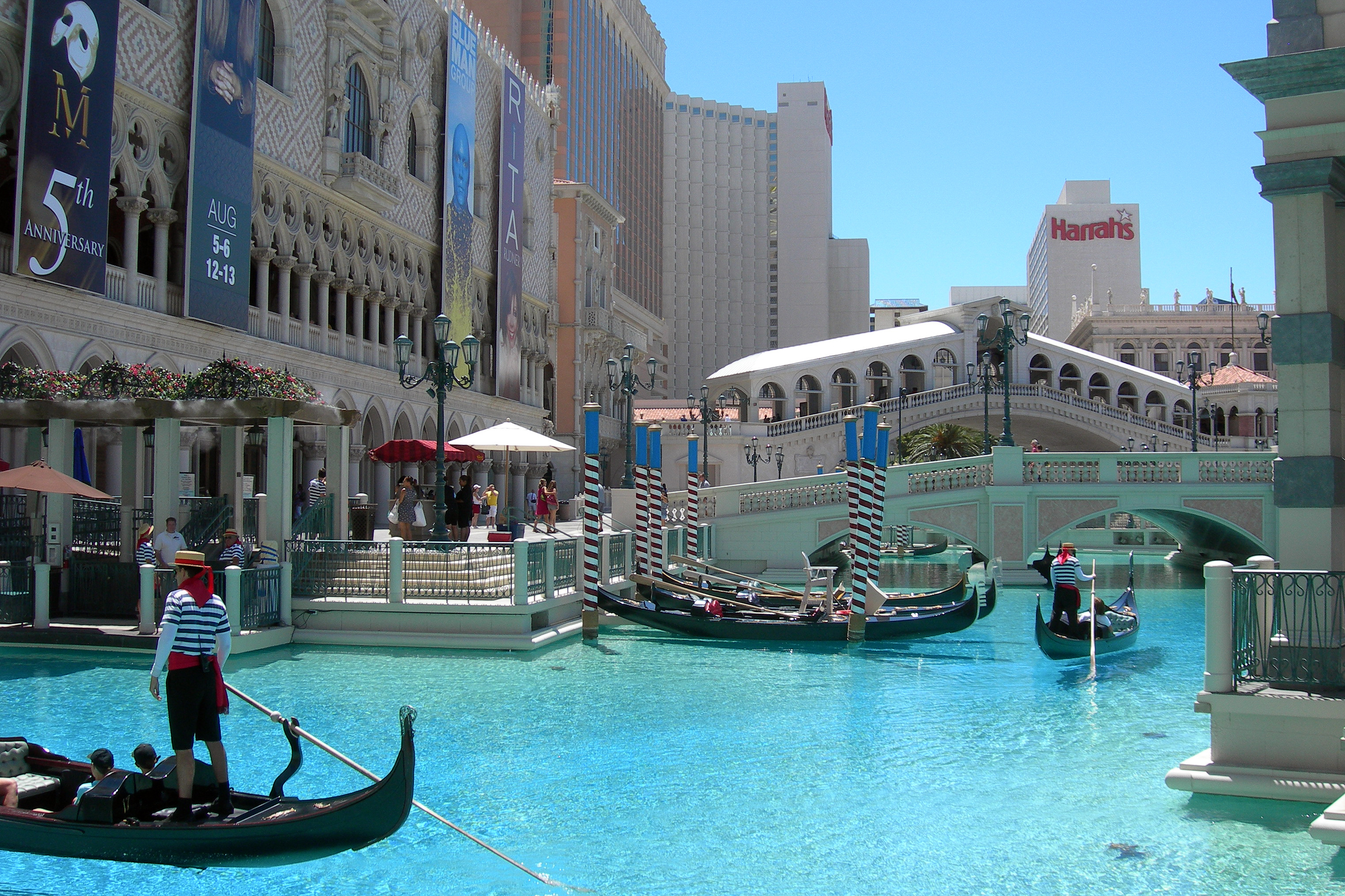 Lago artificiale con gondole del Venetian Hotel, Las Vegas - USA, Agosto 2011